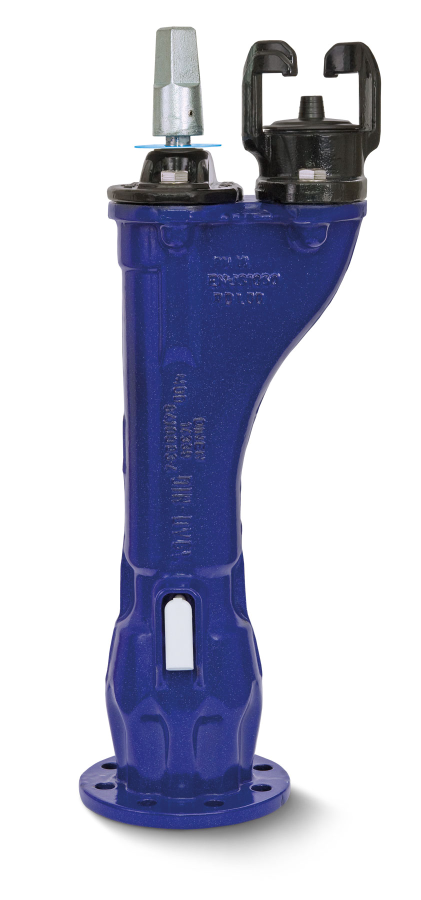 Unterflurhydrant Pro-Email